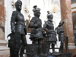 Hofkirche in Innsbruck. Links König Artus (siehe genauer Bild:Artus.jpg).